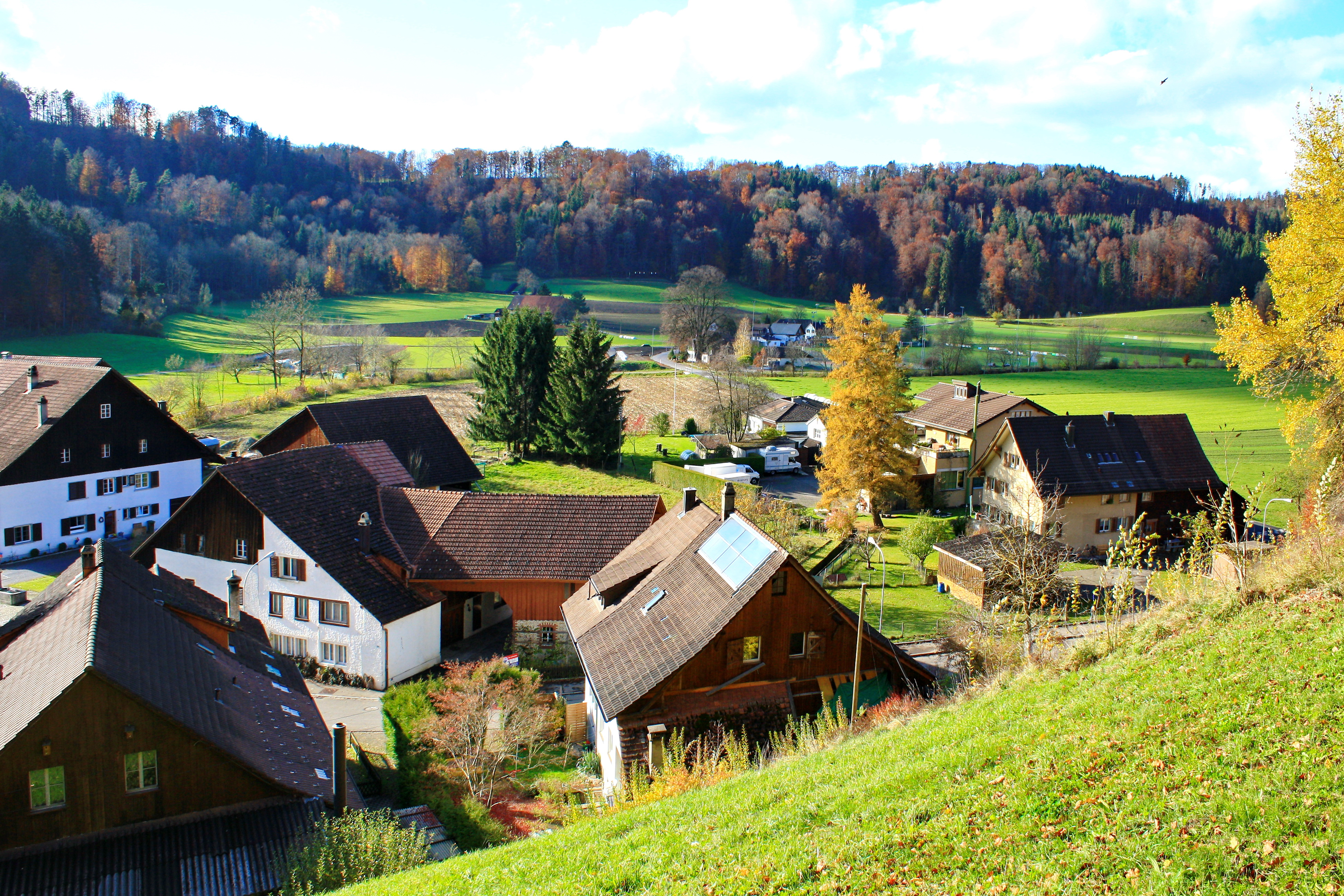 Rikon in the Töss Valley (Tösstal) in Switzerland